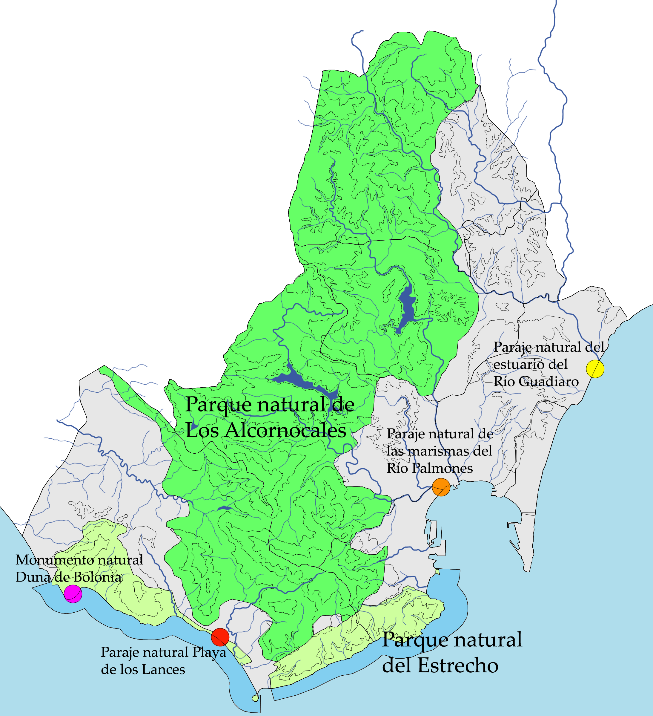 Mapa ilustrativo de las zonas protegidas del Campo de Gibraltar, Andalucía, España